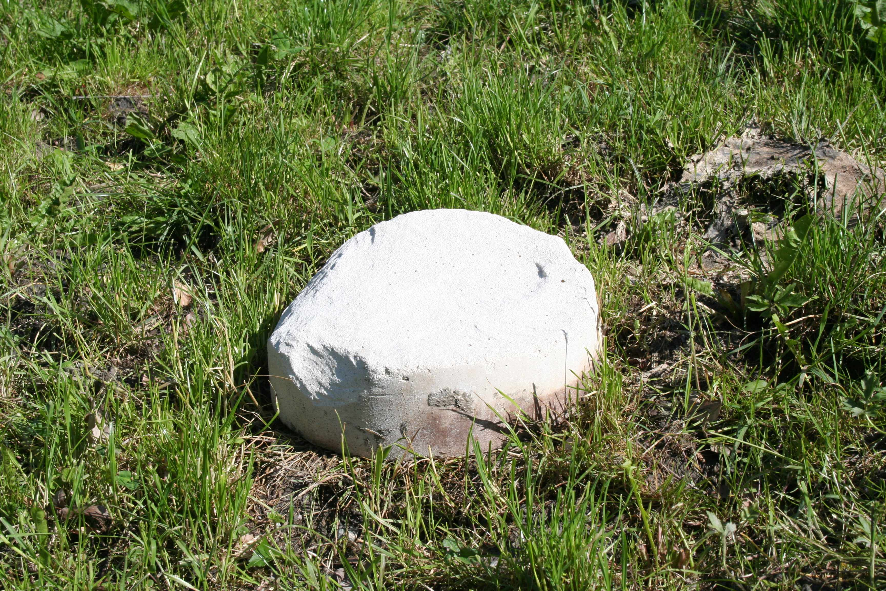 Salzleckstein auf einer Kuheweide